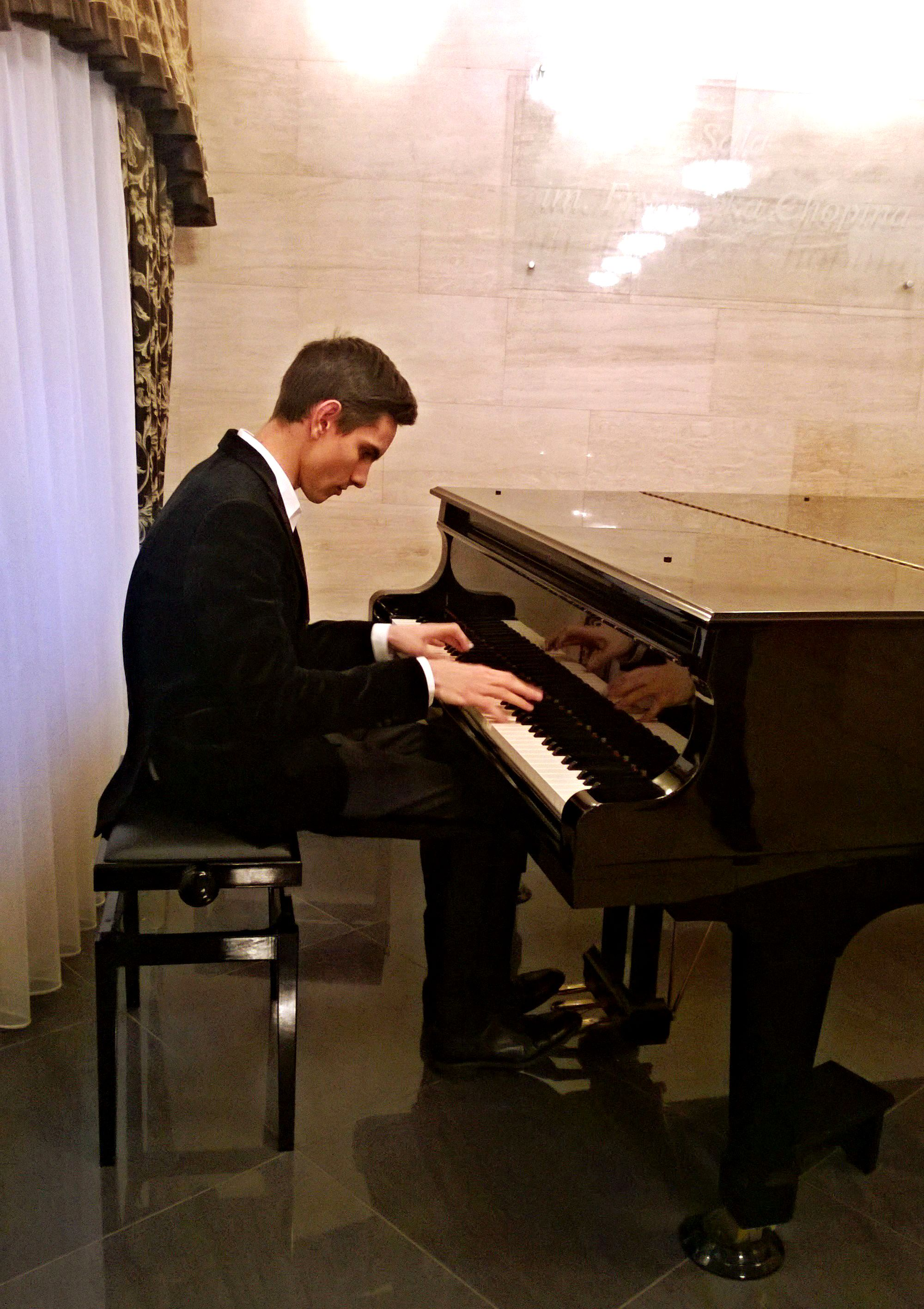 Artysta podczas próby przed koncertem w Żywcu.